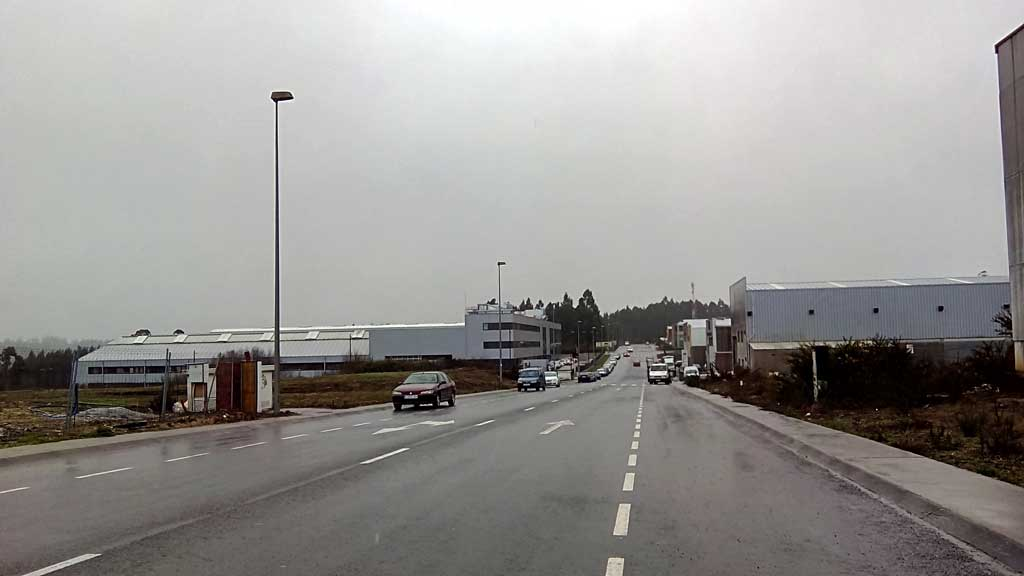 Vista do polígono de Ordes.